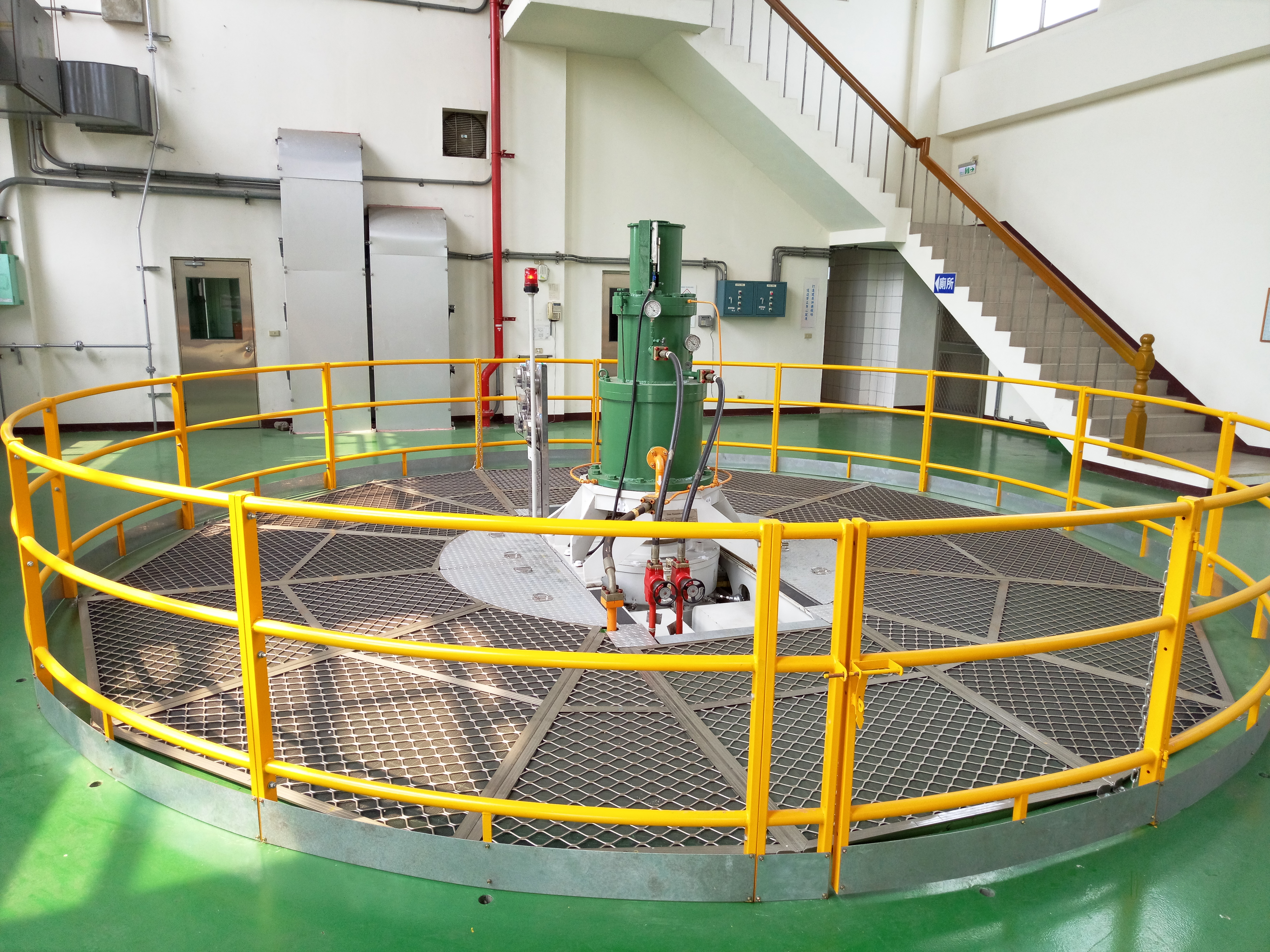 明潭發電廠濁水機組新廠房發電機組頂蓋